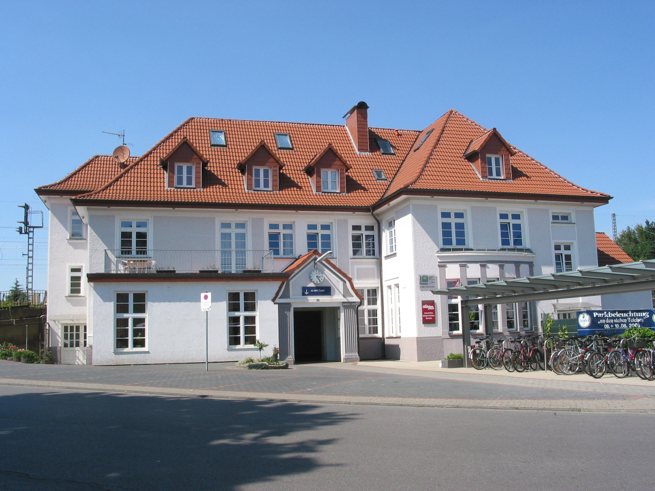 Bahnhof Bielefeld-Brake